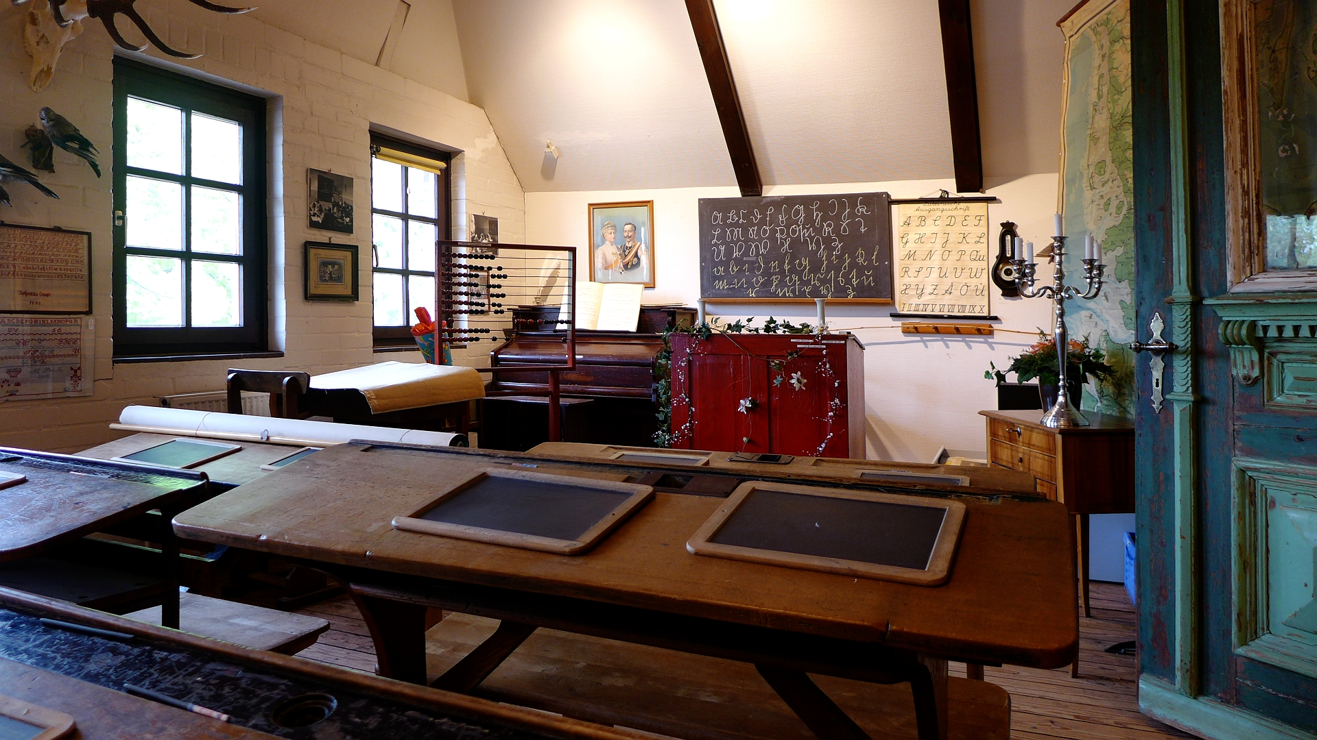 Klassenzimmer aus der Anfangszeit des 20. Jahrhunderts im Stormanschen Dorfmuseum Hoisdorf. Wandtafel mit Sütterlin-Schrift. Aufnahmedatum 2015-05.